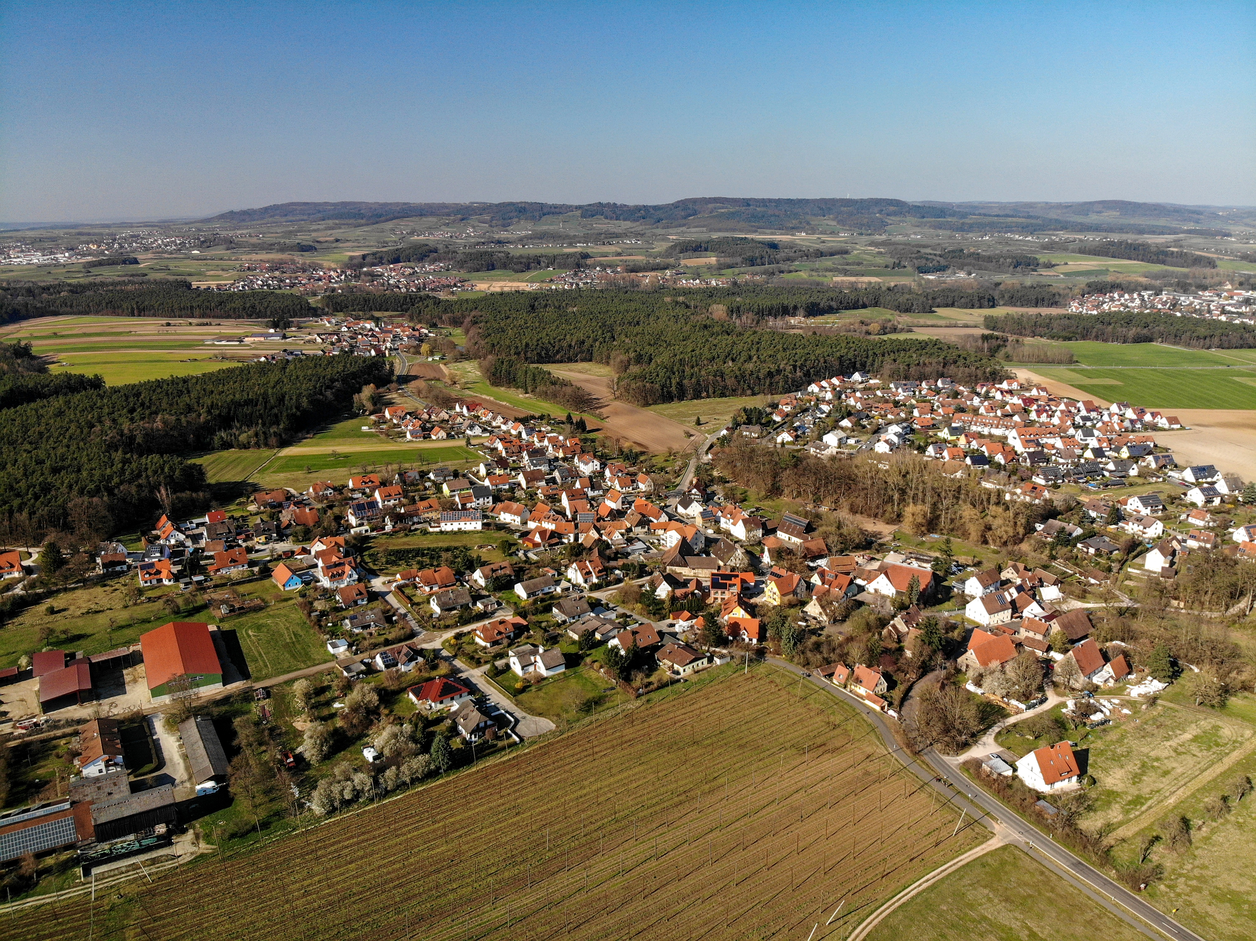 Oberschöllenbach Luftaufnahme (2020)